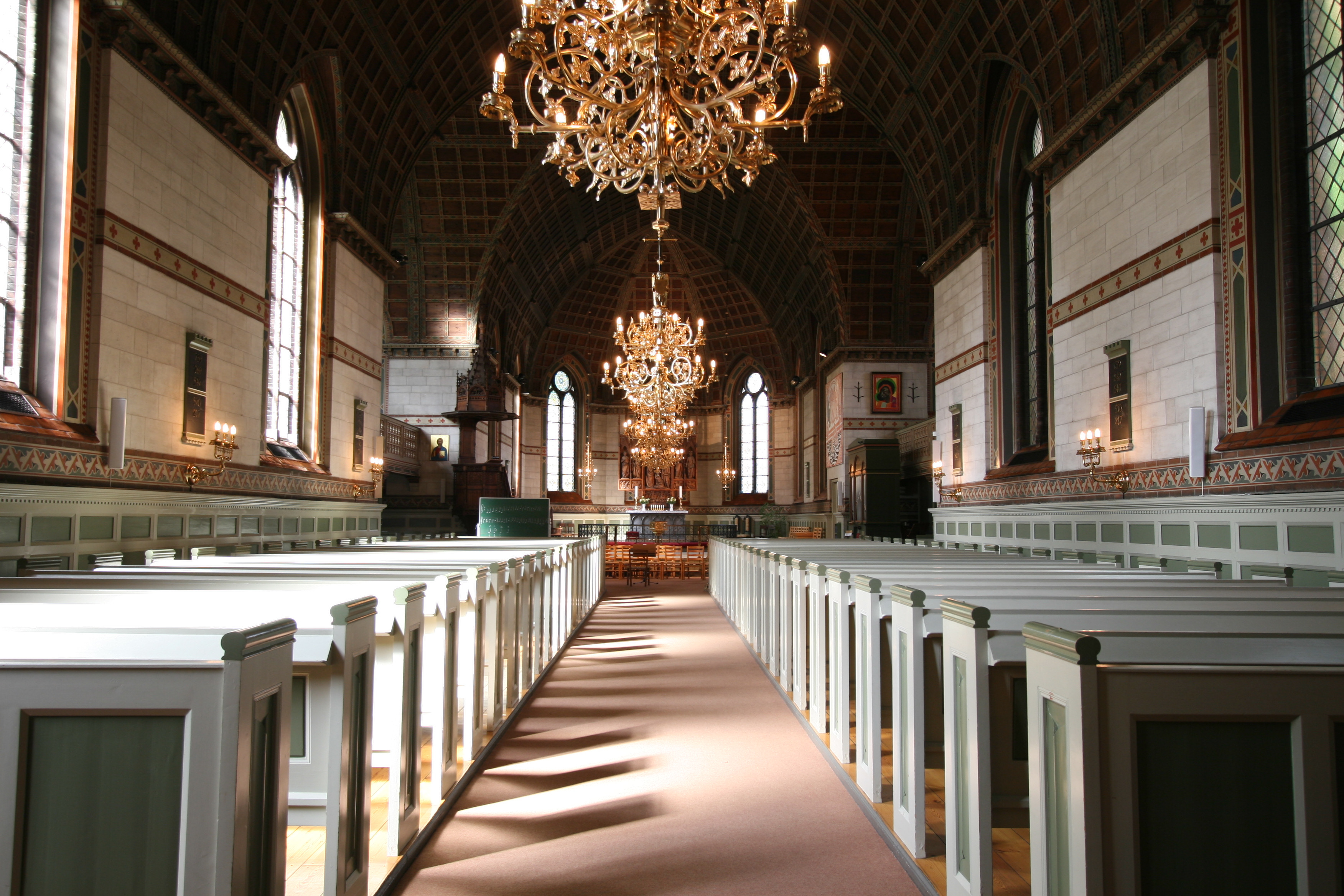 Hellig Kors Kirke, Copenhagen, Denmark. Interior